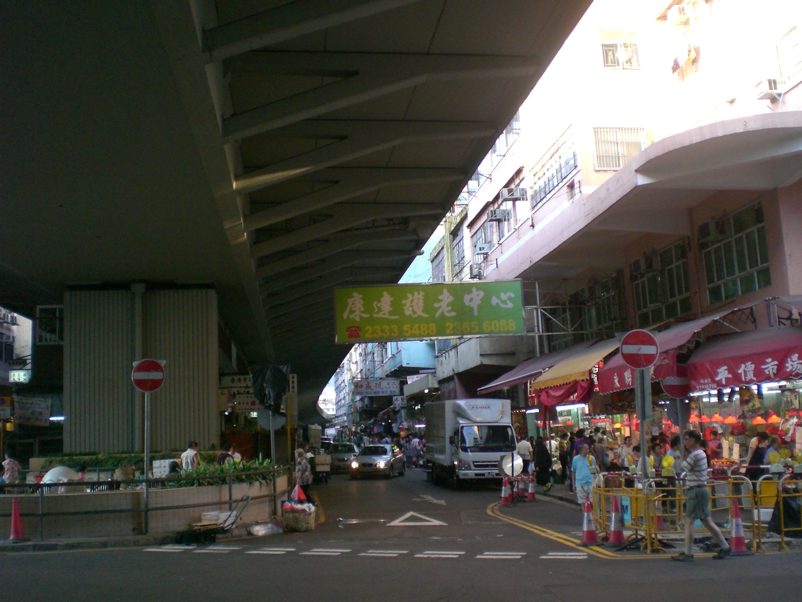 東九龍走廊行車天橋底的zh:街市在九龍城道